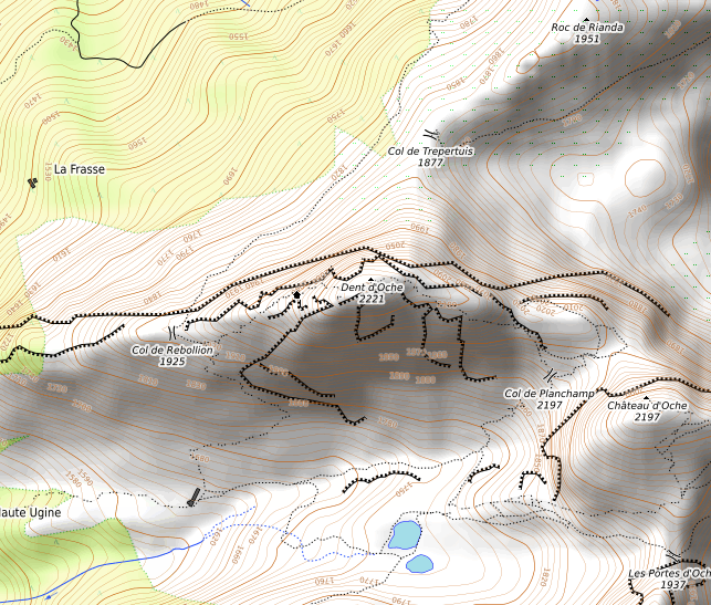 carte réalisée sur umap This map may be incomplete, and may contain errors. Don't rely solely on it for navigation.